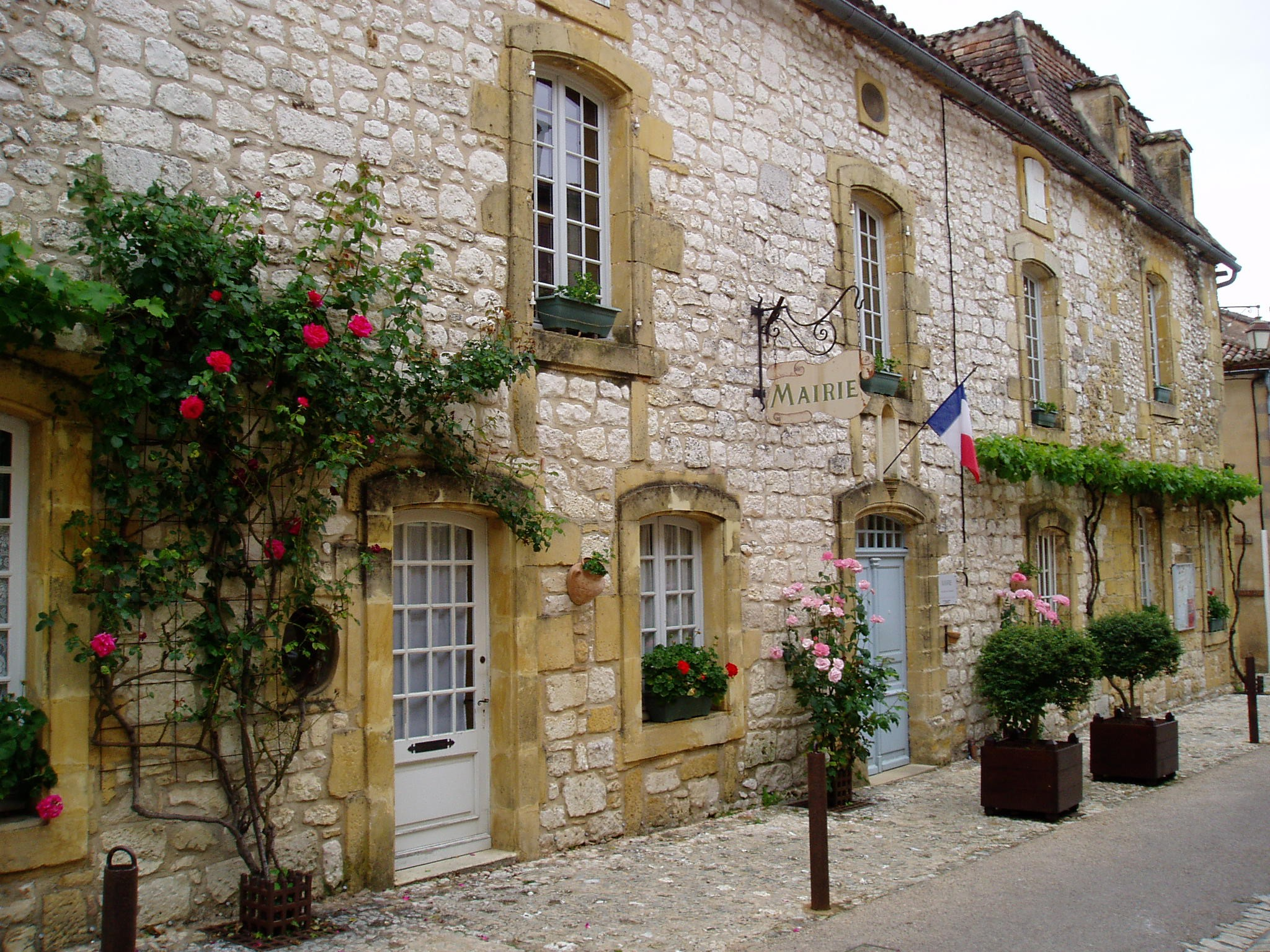 Façade de la mairie